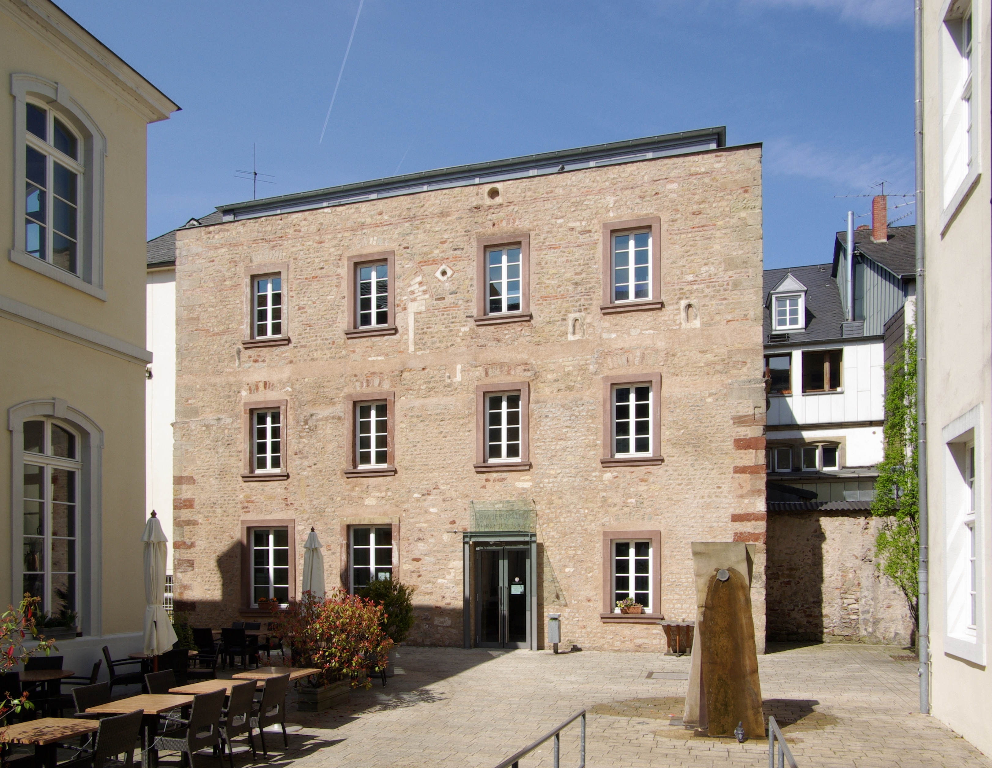 Trier,Turm Jerusalem: romanischer Turmbau, Kalkstein- und Ziegelmauerwerk, 11. und 12. Jahrhundert